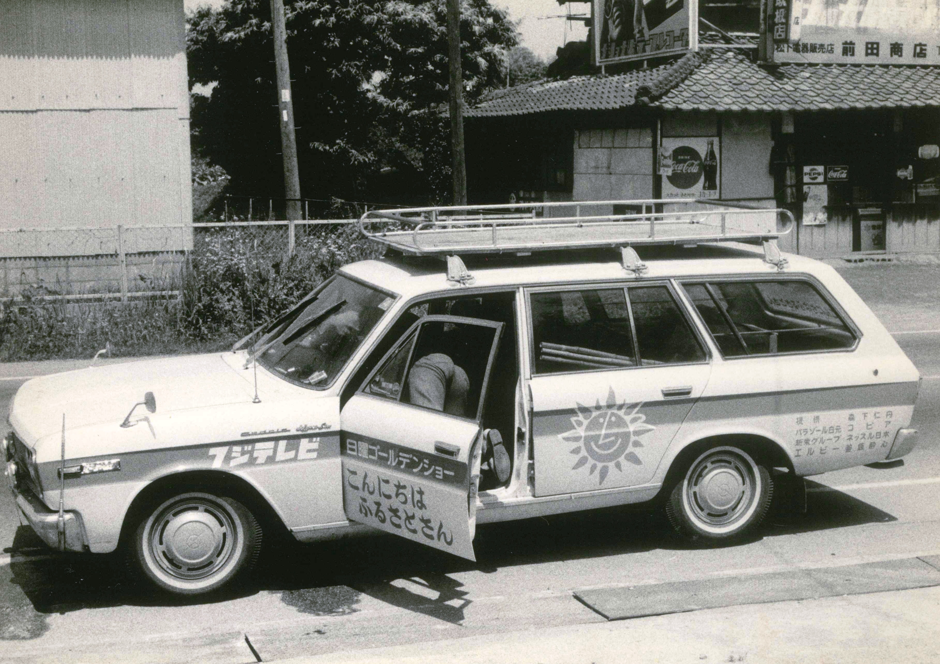 フジテレビがお昼12：00から放送していた情報番組「こんにちはふるさとさん」で使用されていたキャラバン隊のワゴン車です。 この車で日本中を走り回っていました。